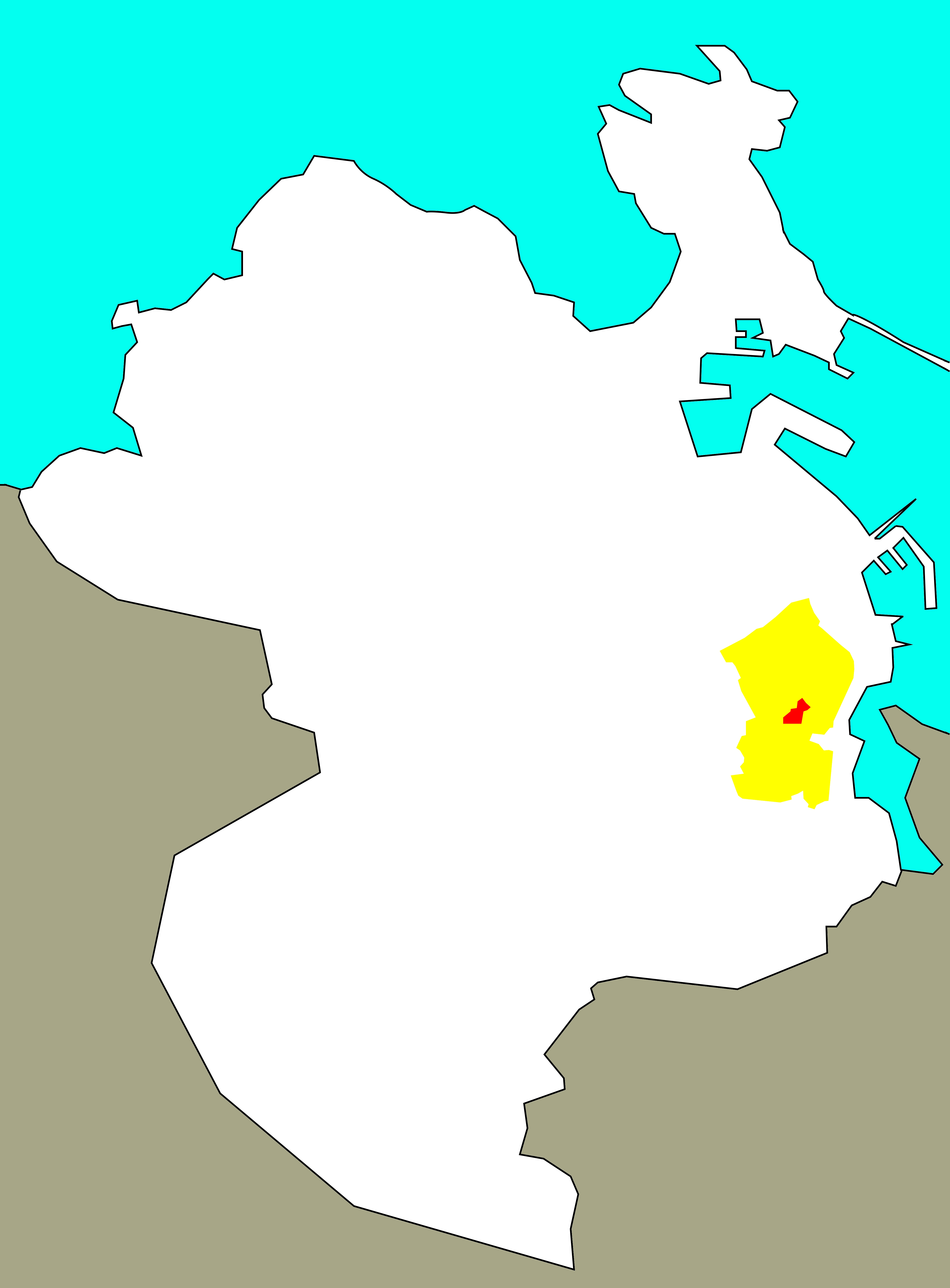 Situación de Castaño de Eirís no concello da Coruña, segundo